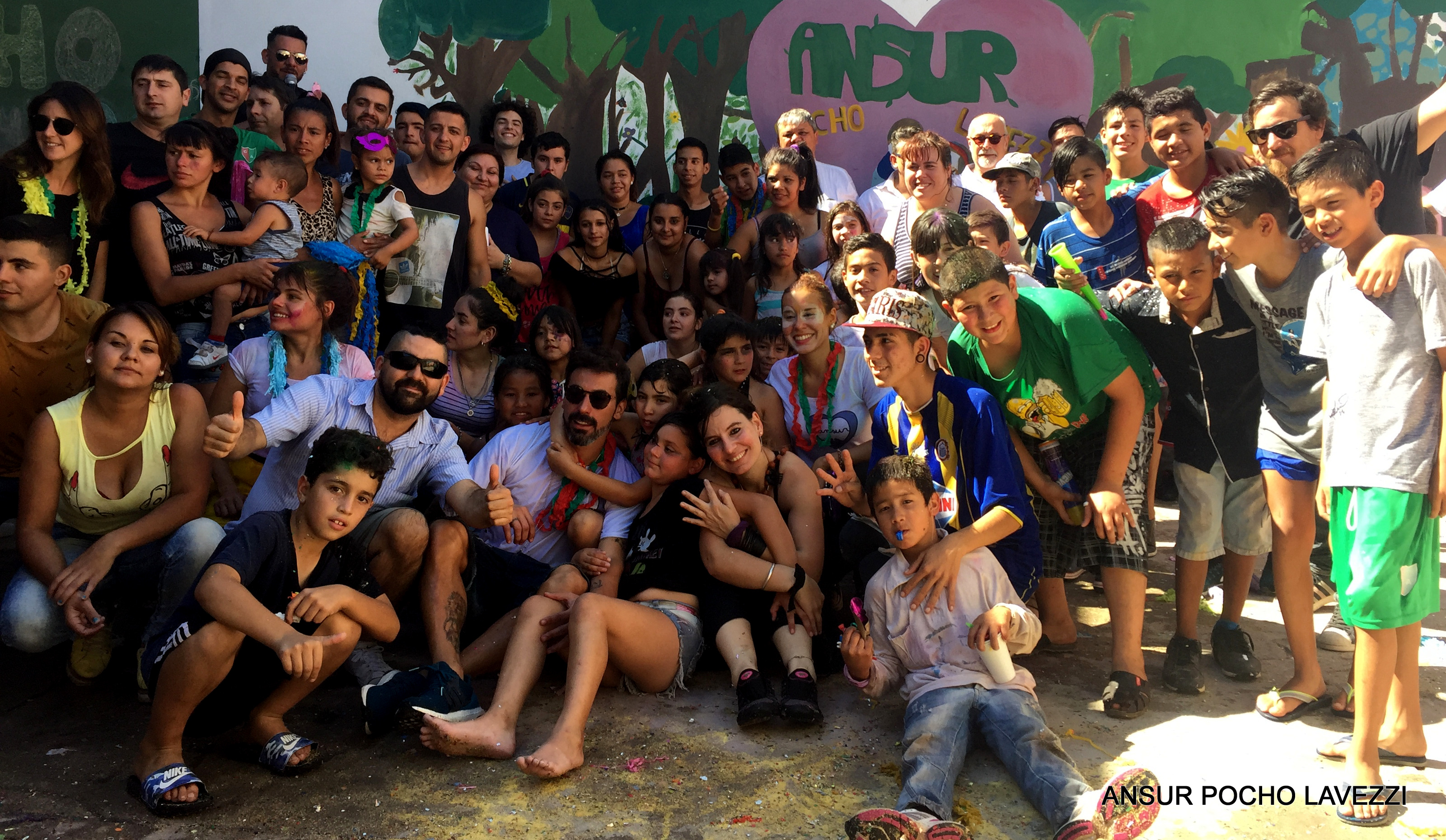 Ezequiel compartiendo el trabajo comunitario en su organización